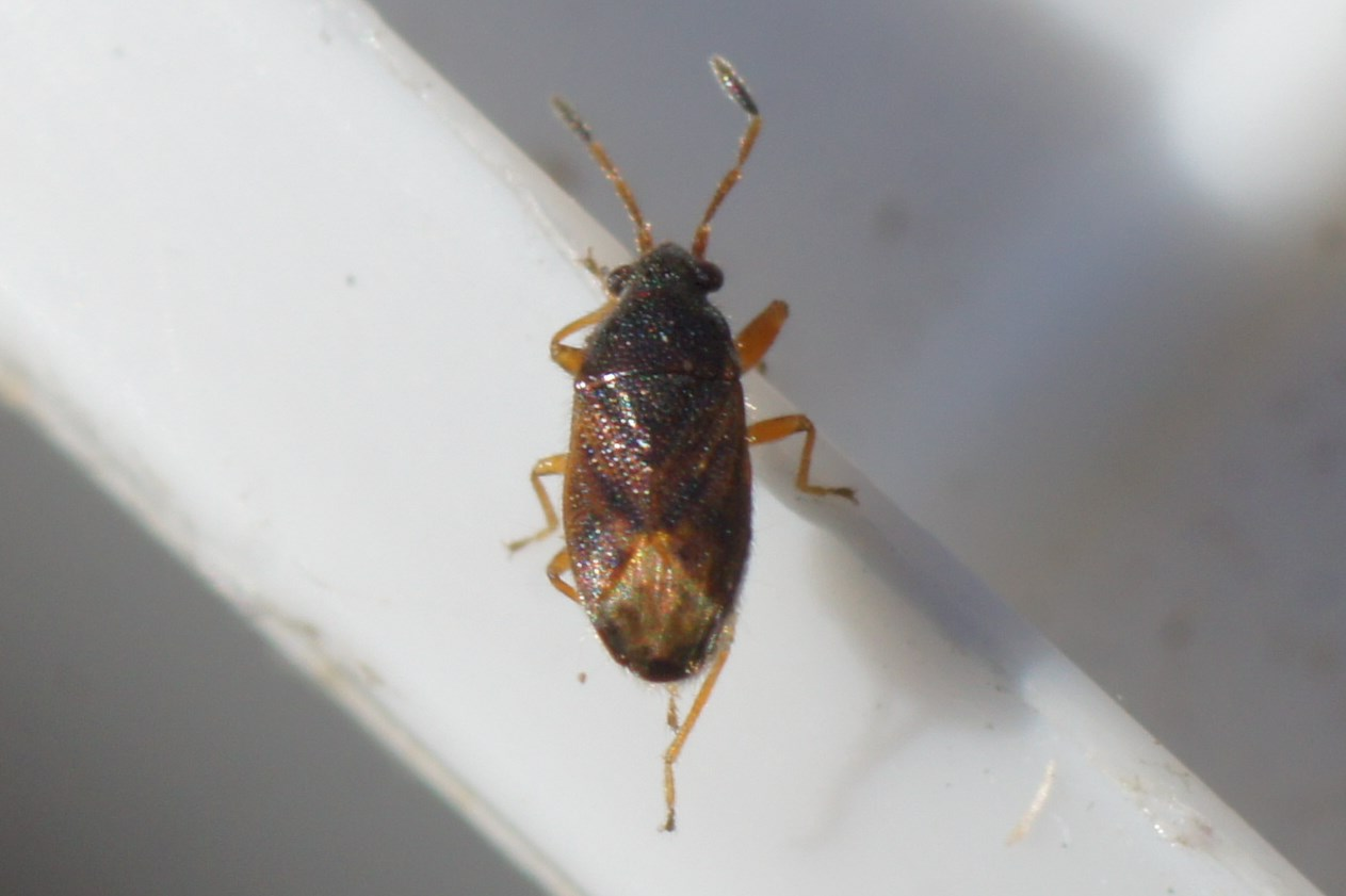 Stygnocoris sabulosus, glanzende donsrug.